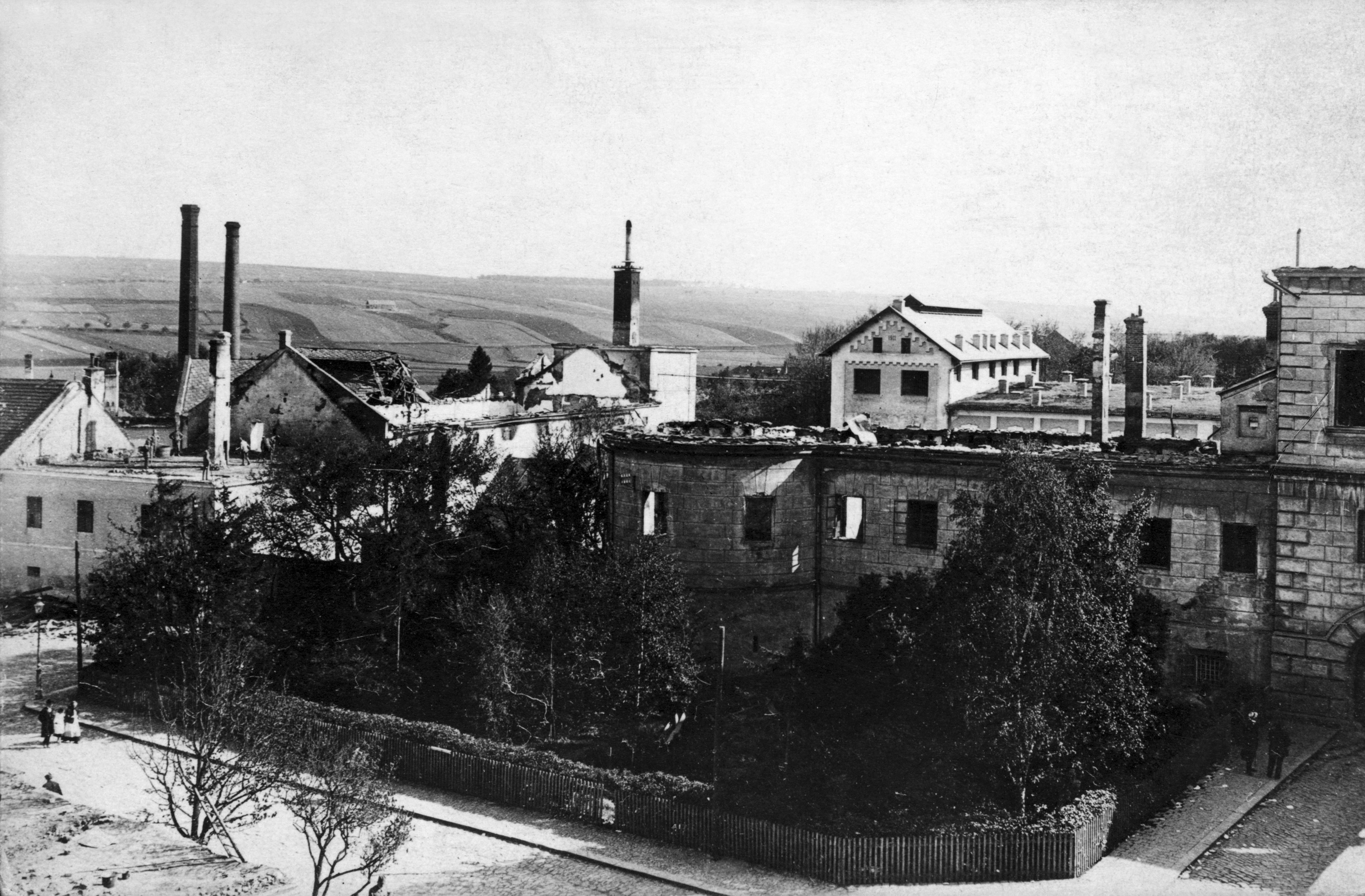 Pivovar po požáru 1917 (Vyškov- czech republic)